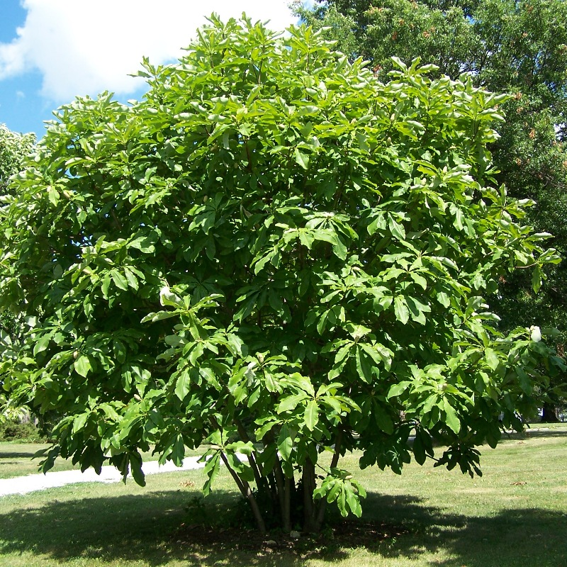 Magnolia tripetala (Umbrella Magnolia)